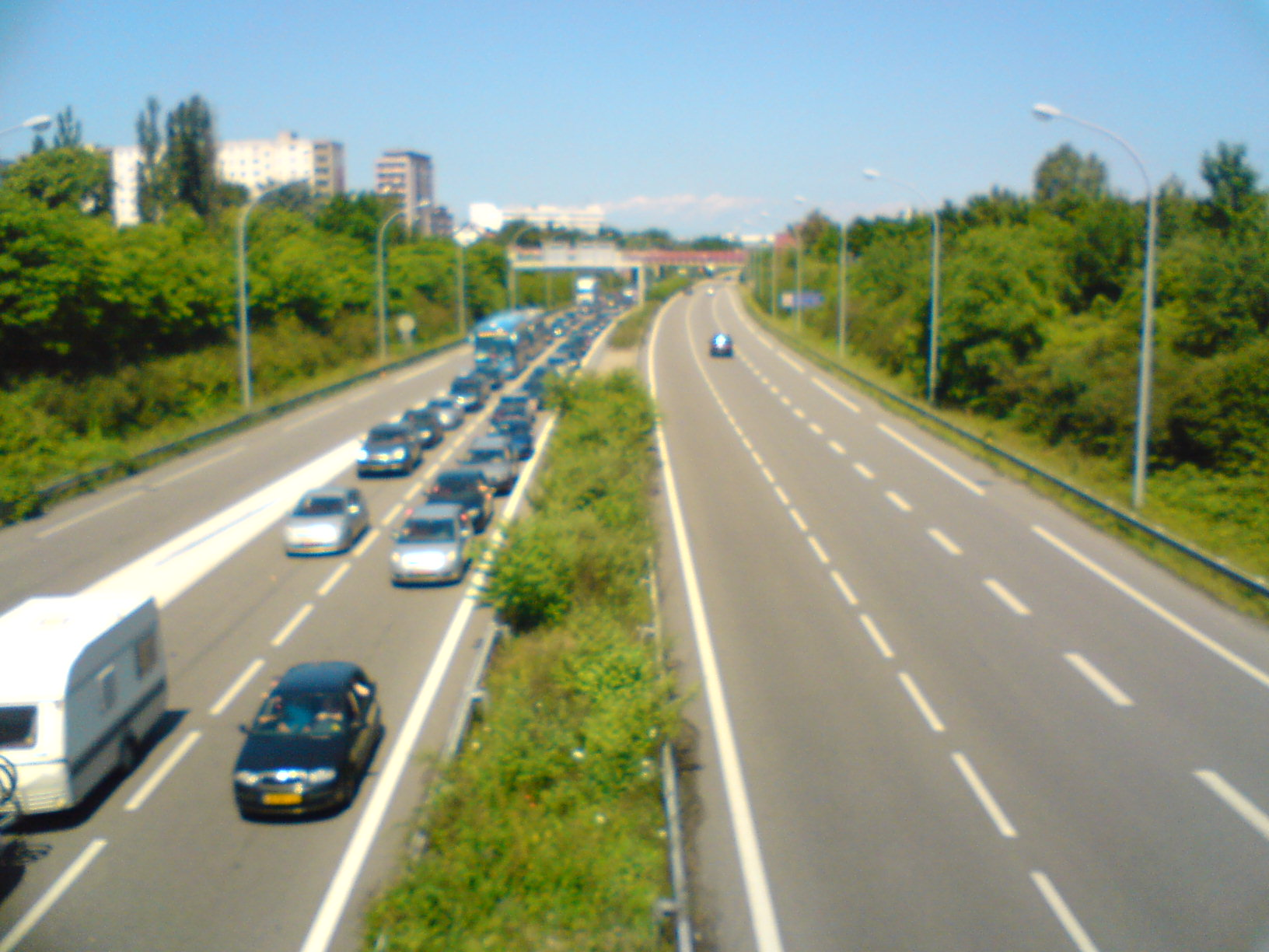 Embouteillages quelques heures avant le match entre la Hollande et la Russie pour l'Euro 2008.